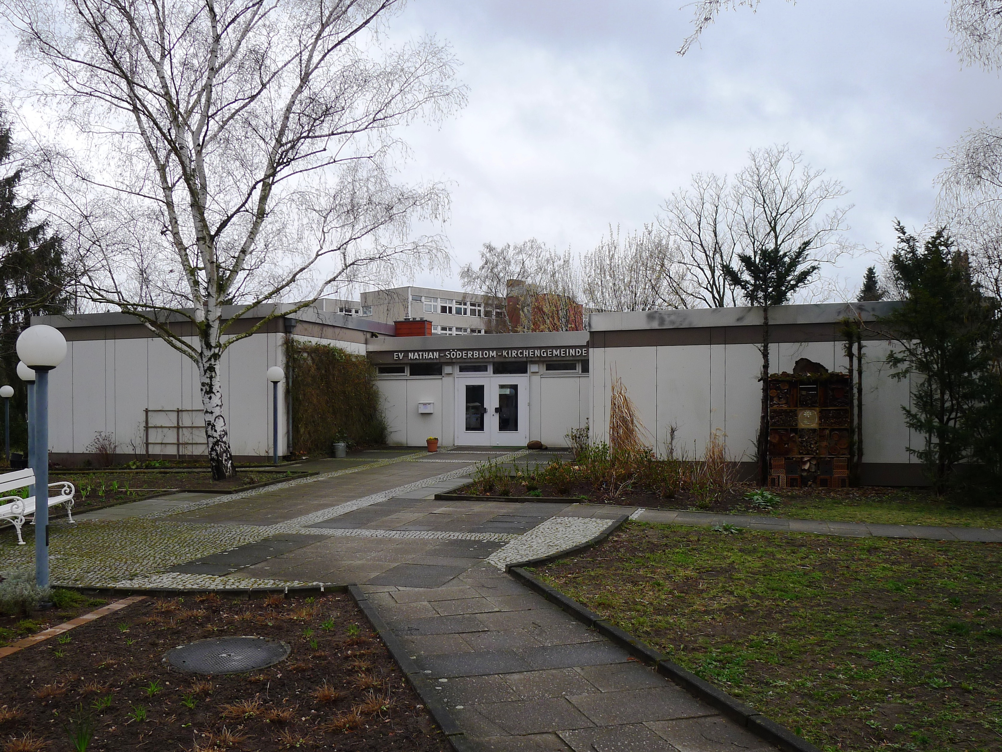 Blick auf die Kirche vom Grundstückseingang aus